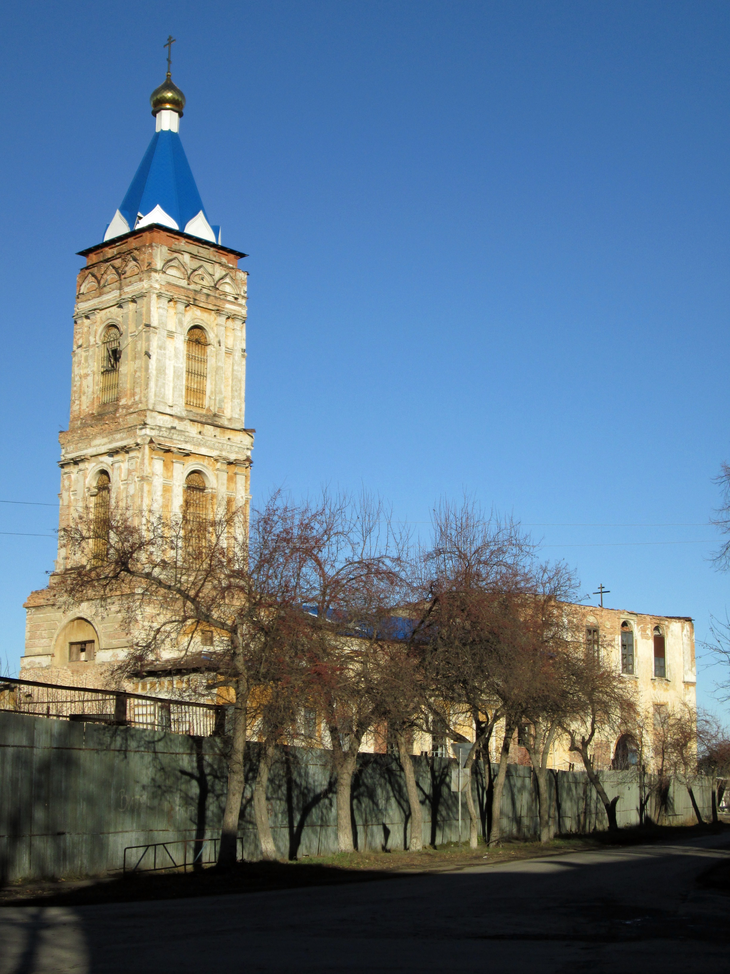 Сретенская церковь (Свердловская область, Ирбит, терр. автоприцеп. з-да)